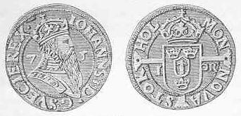 Johan III:s öres mynt anno 1575.